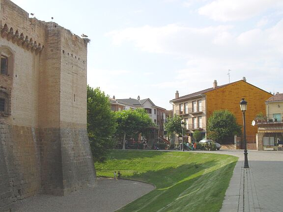 Castillo de Marcilla, antes de la restauración.